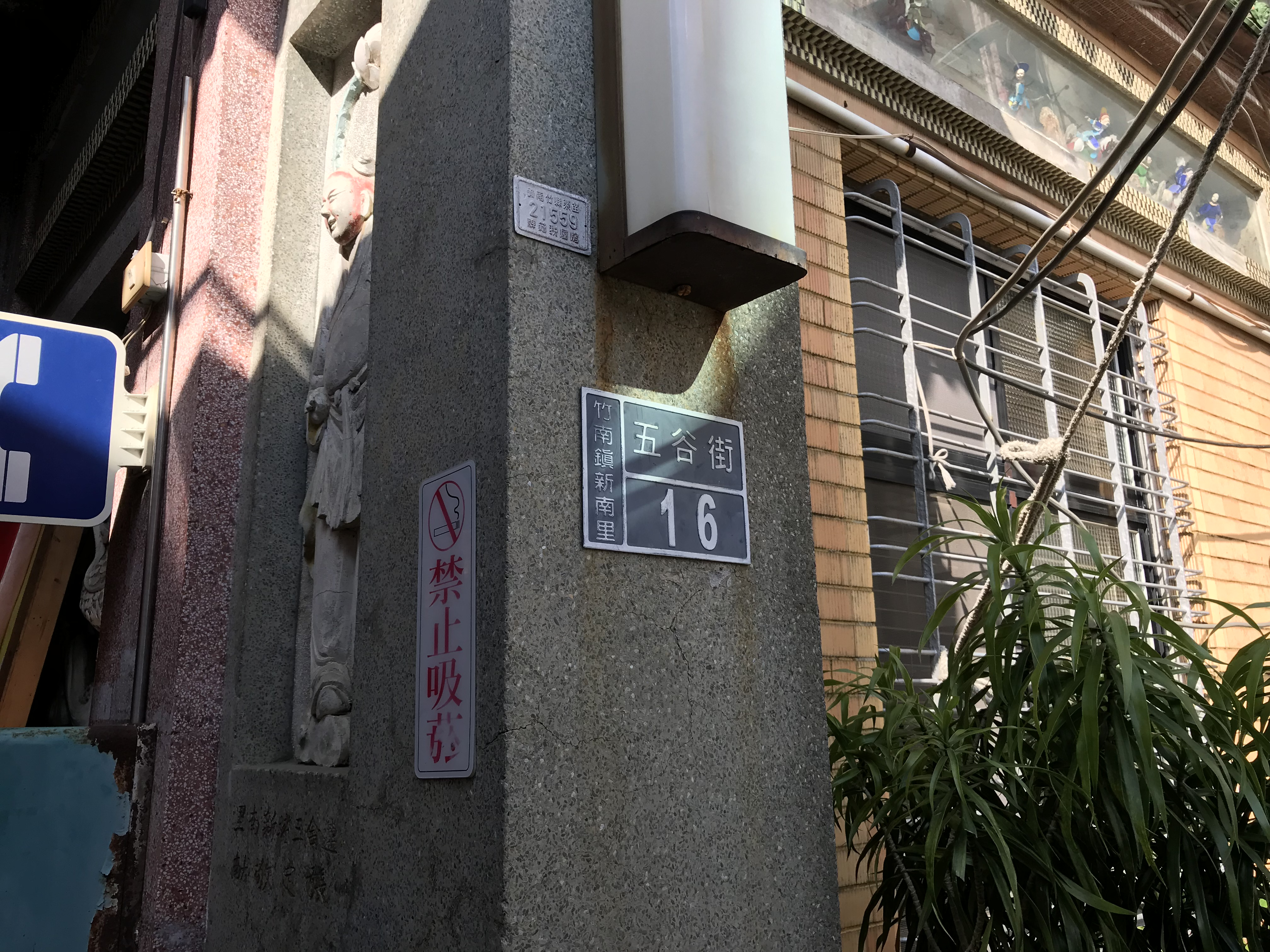 竹南五穀宮門牌